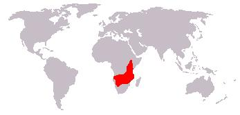 Connochaetes taurinus Bewerking afbeelding: Afbeelding_(kaart).JPG